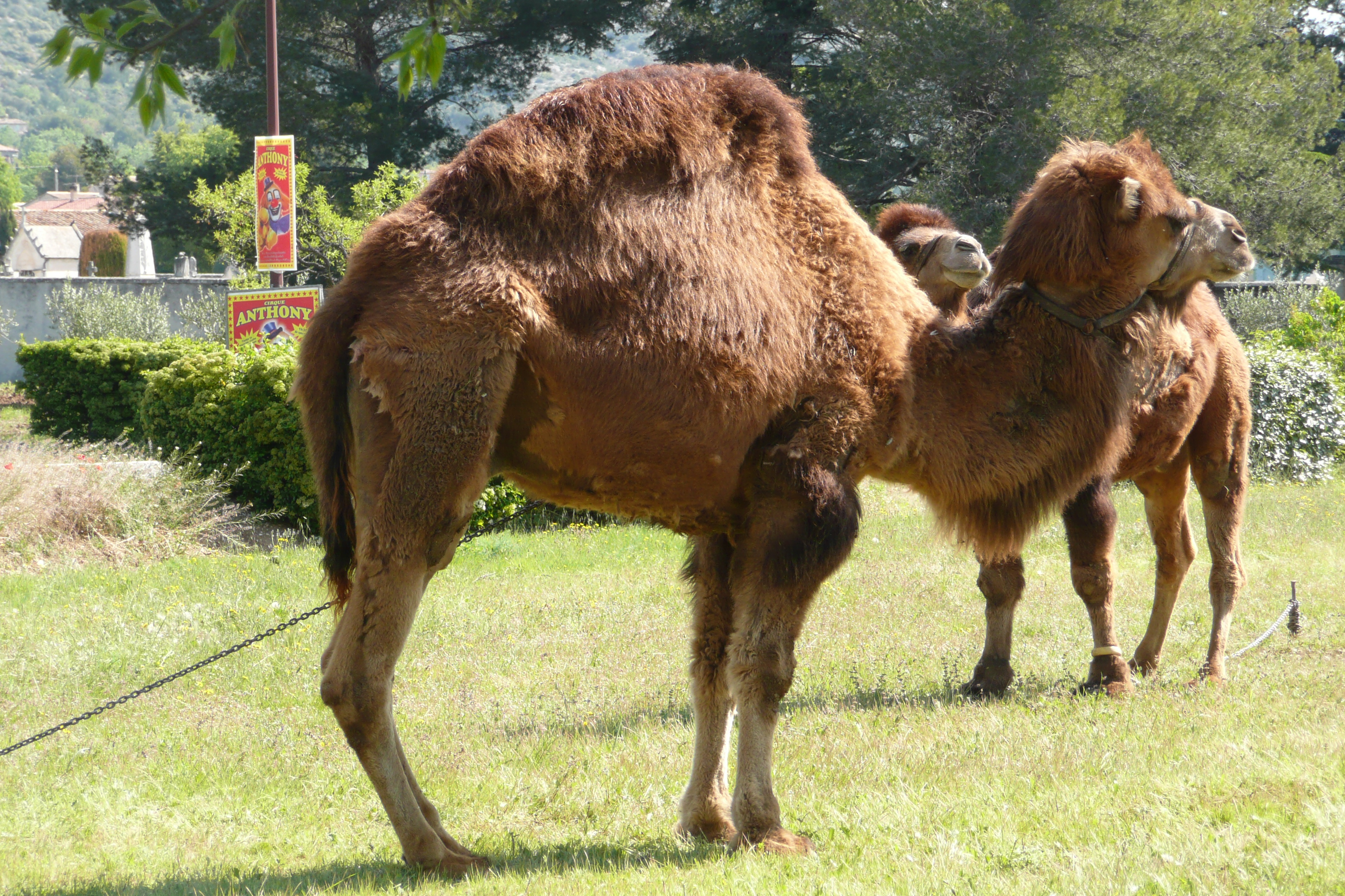 Camelus dromedarius près de Mérindol.